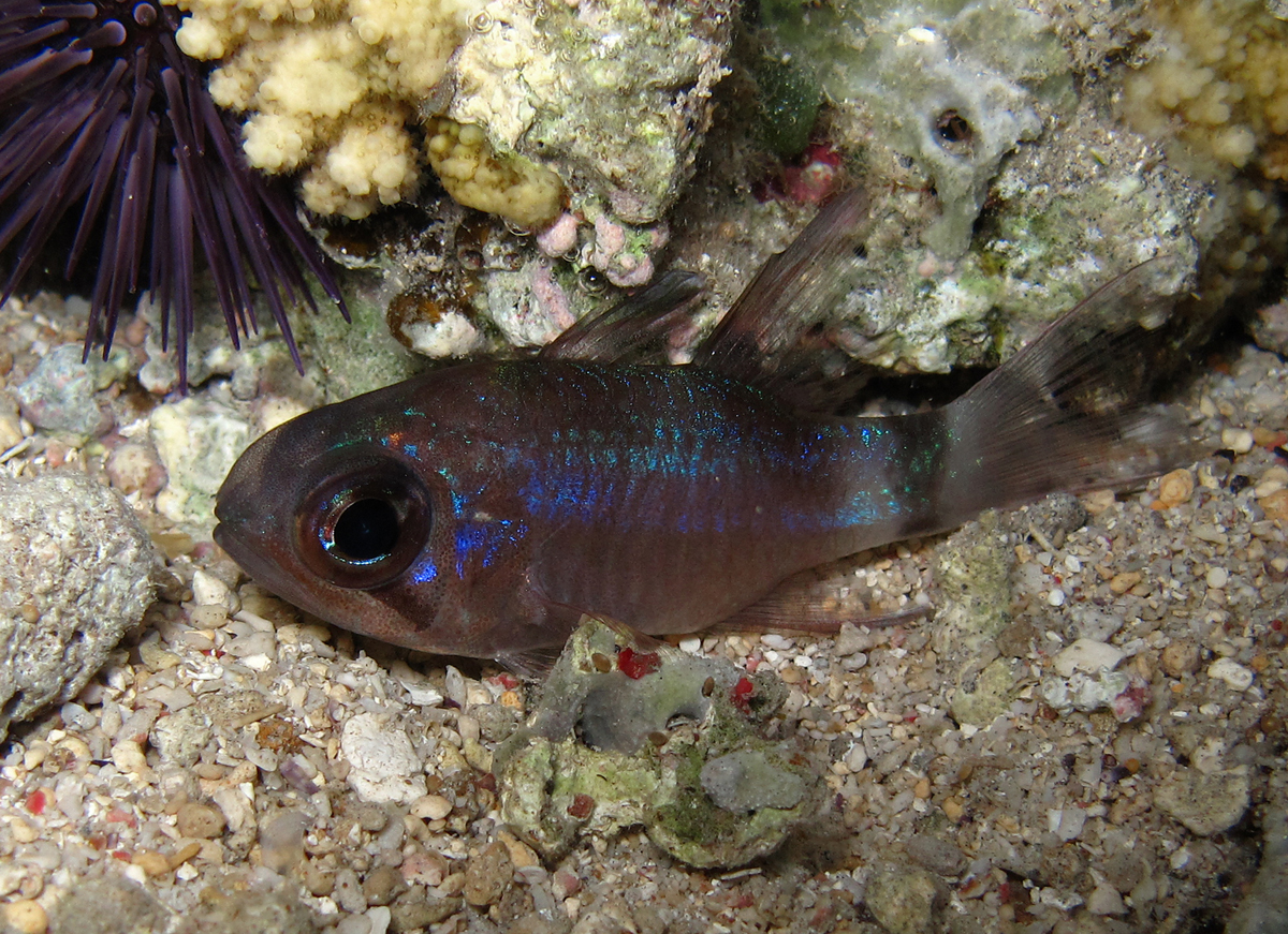 Nectamia savayensis à la Réunion.